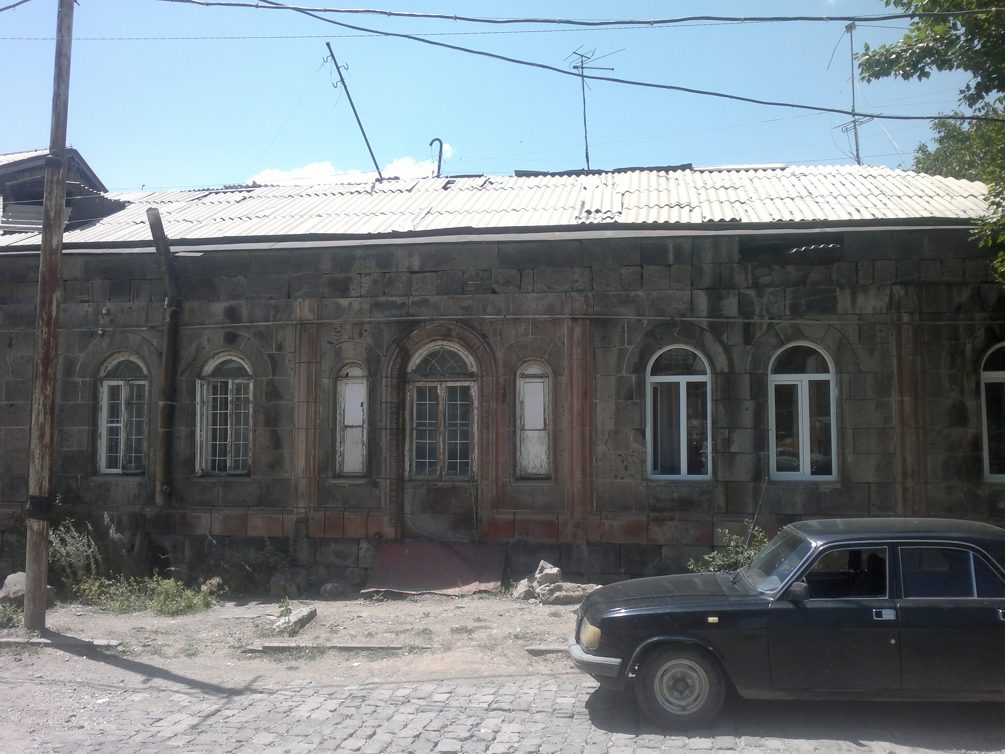 Գյումրվա առանձնատուն